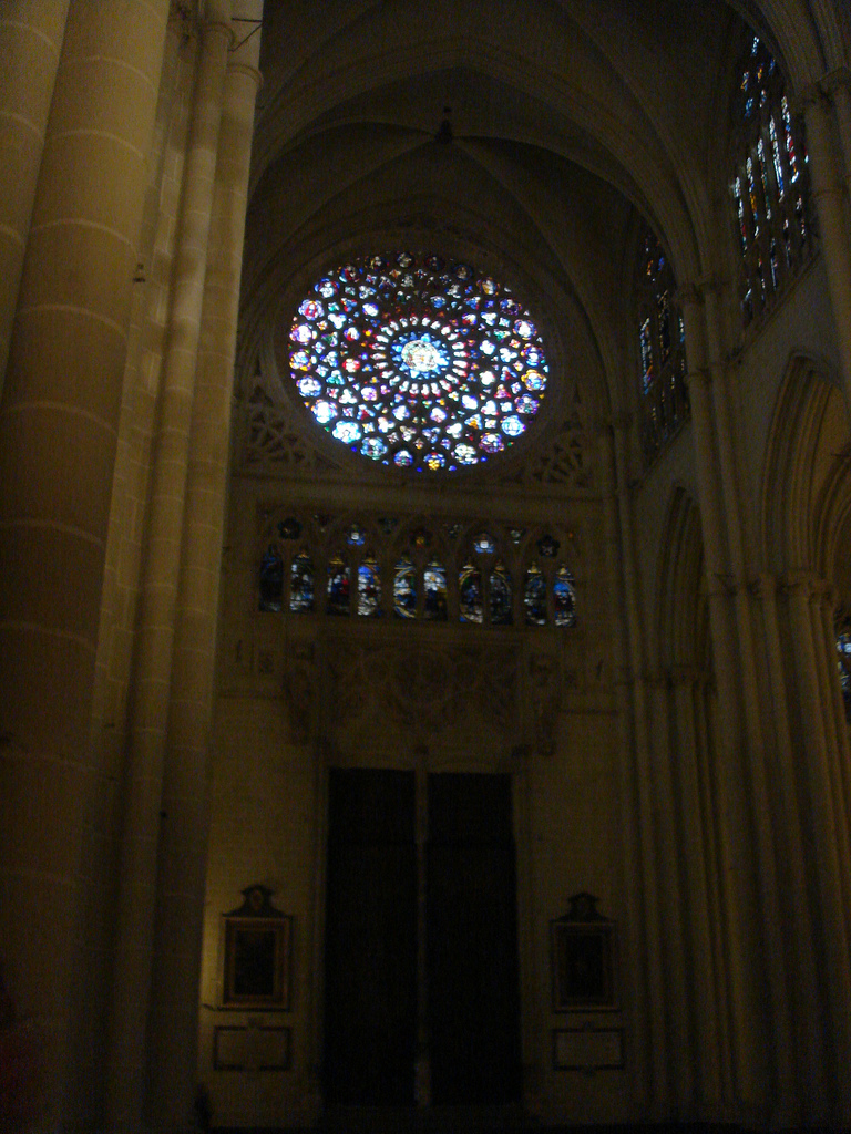 Rosetón de la Catedral de Toledo, España.